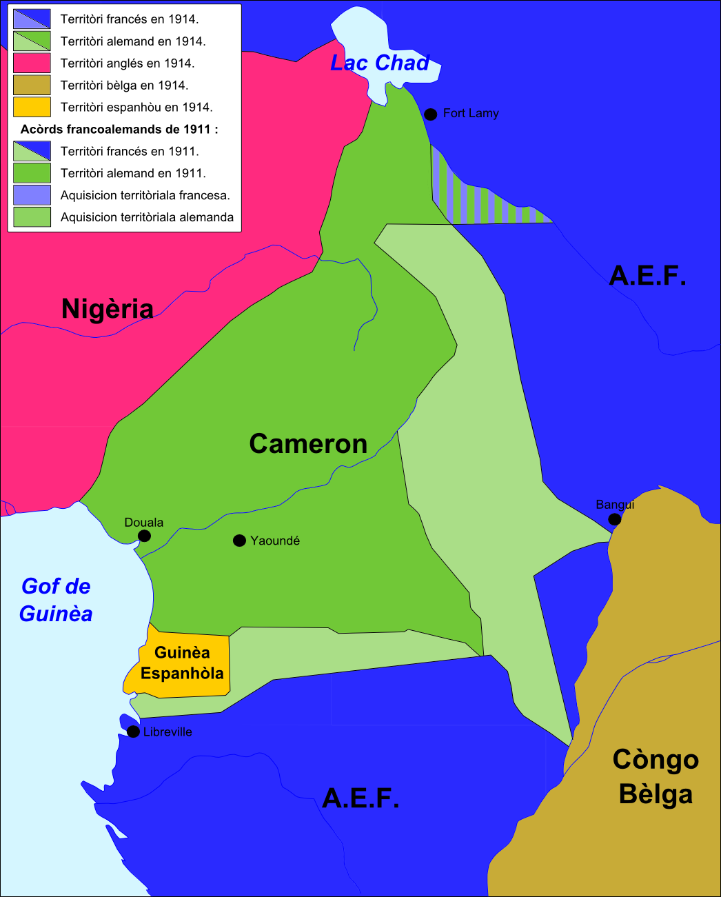 Periòde coloniau alemand en Cameron.